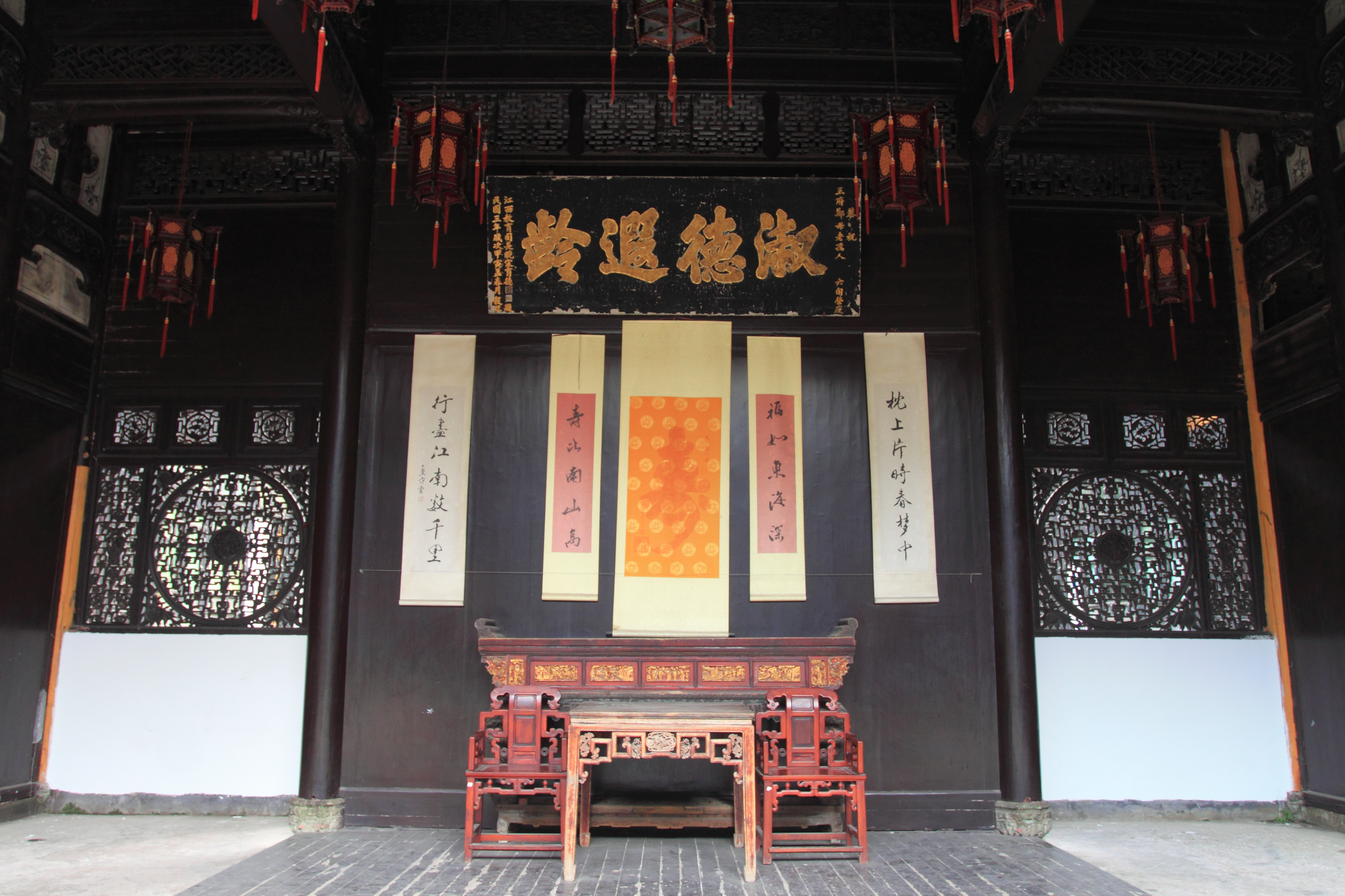 上饶市信州区相府路17号民宅 —— 正厅